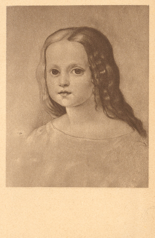 Alma von Goethe. Goethes Enkelin.